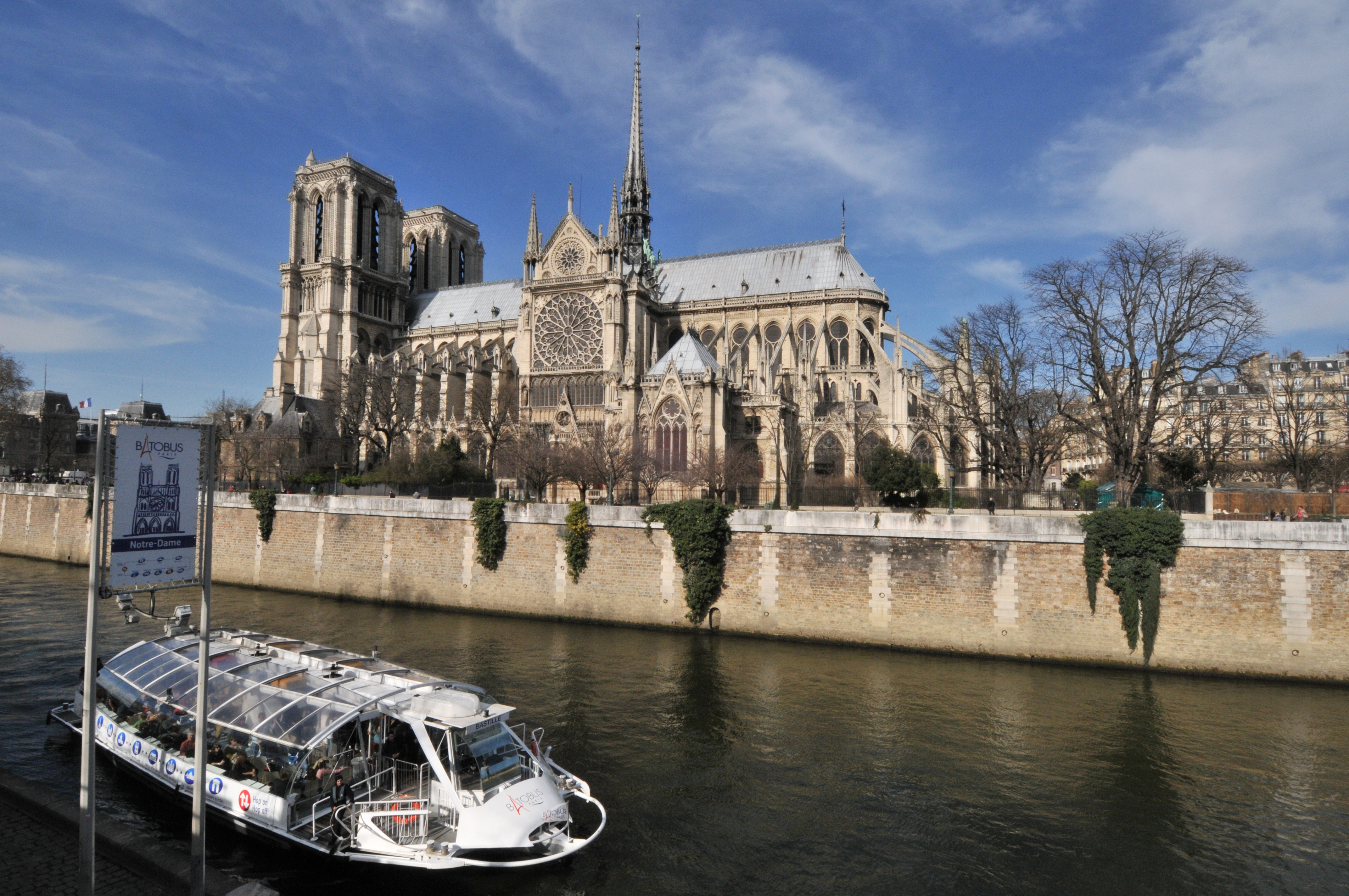 cathedrale Notre-Dame de Paris